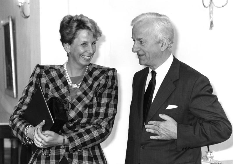 Bonn, 23. Mai 1990 Bundespräsident Dr. Richard von Weizsäcker empfing die Präsidentin der Volkskammer der Deutschen Demokratischen Republik, Frau Dr. Sabine Bergmann-Pohl, zu einem ausführlichen Meinungsaustausch in der Villa Hammerschmidt.